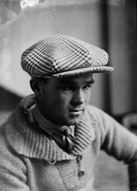 Gaston Rebry lors du Tour de France 1929